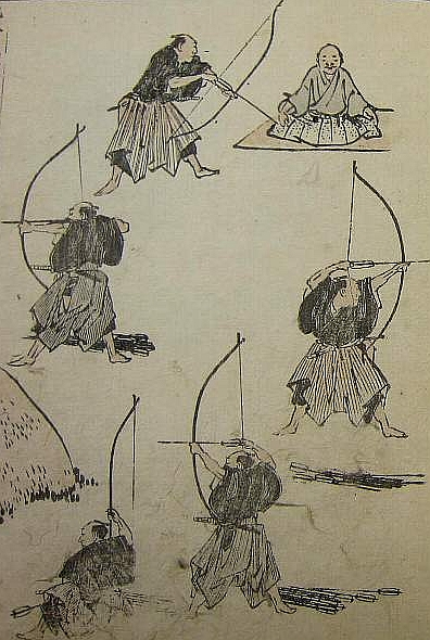 『北斎漫画』第六編（文化14年）葛飾北斎著から。From Hokusai Manga volume 6 (1817).